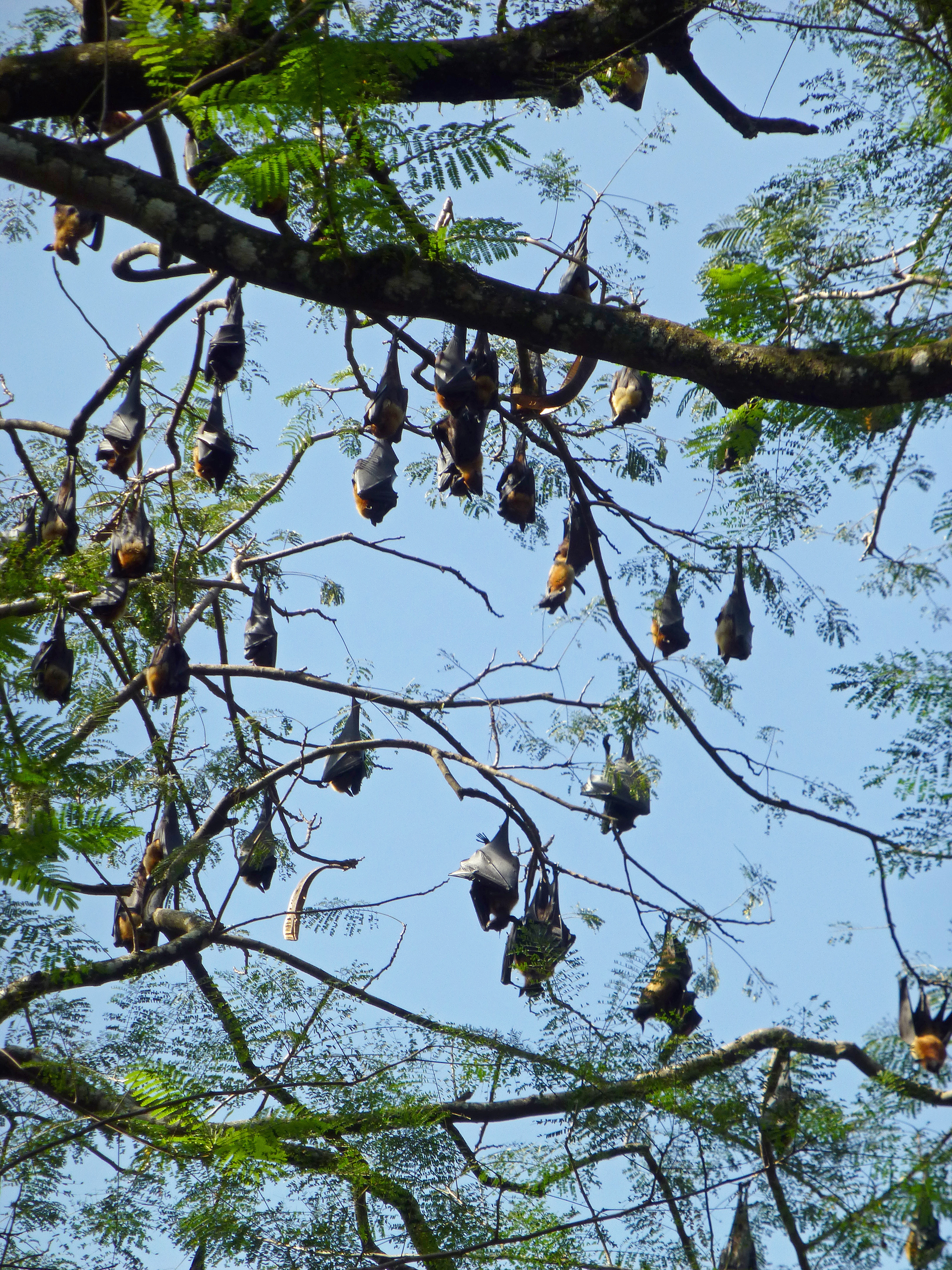 Chauves-souris frugivores dans les arbres du Jardin botanique de Kandy (Sri Lanka)